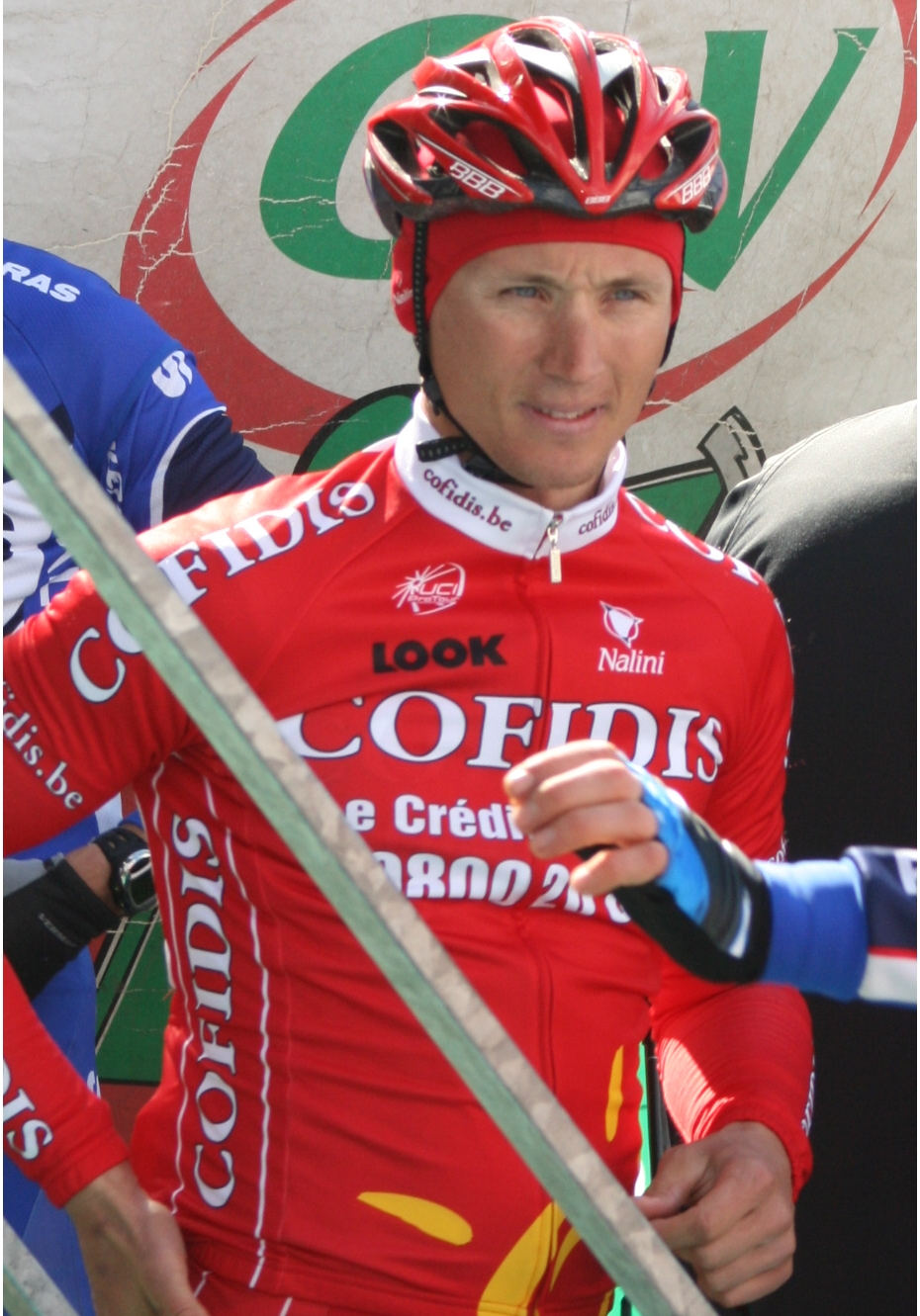 Alexandre Usov au Grand Prix E3 2009